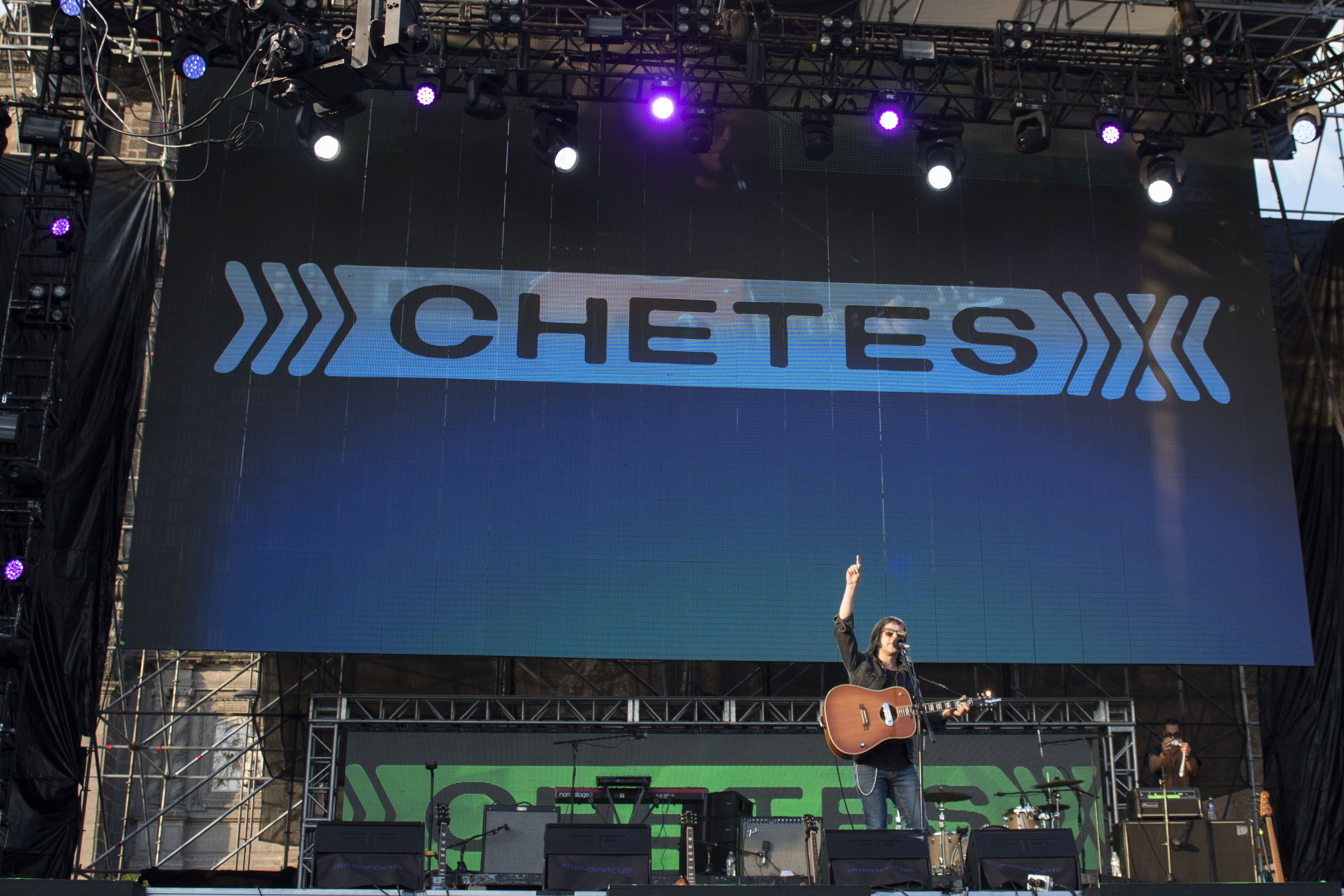 Sábado 12 de noviembre de 2017. Como parte de las actividades de la Semana de las Juventudes del 2017, este sábado 12 de noviembre se desarrolló un segundo concierto masivo en la plancha del Zócalo capitalino. Las bandas que se presentaron en esta ocasión fueron: Marcelo Viejo, Charlie Rodd, Ely Guerra, Dorian, Chetes, La Gusana Ciega, División Minúscula, El Tri y Fatboy Slim. Fotografía: Carlos Luna / Secretaría de Cultura CDMX